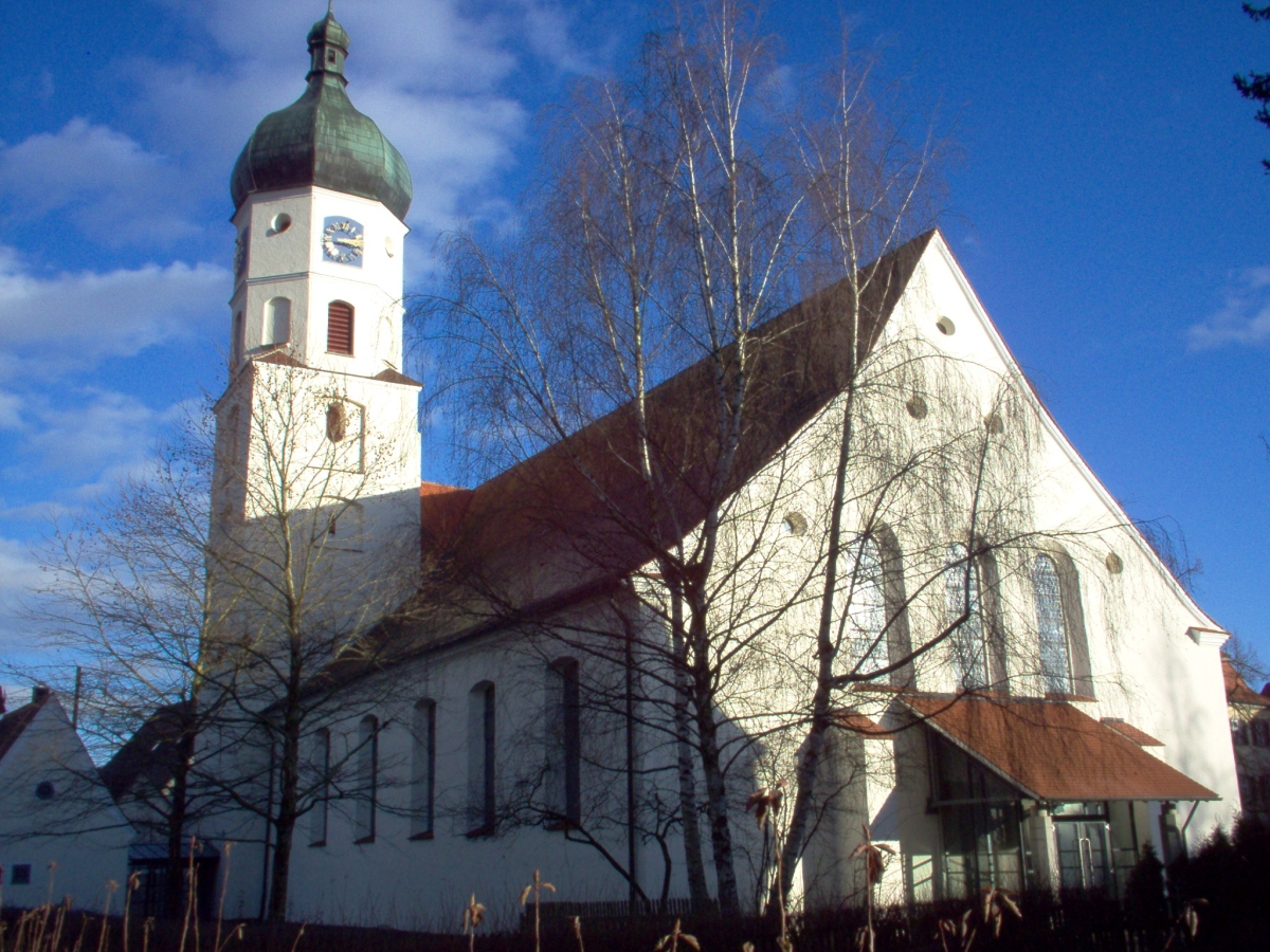 Liebfrauenkirche Mengen, Germany